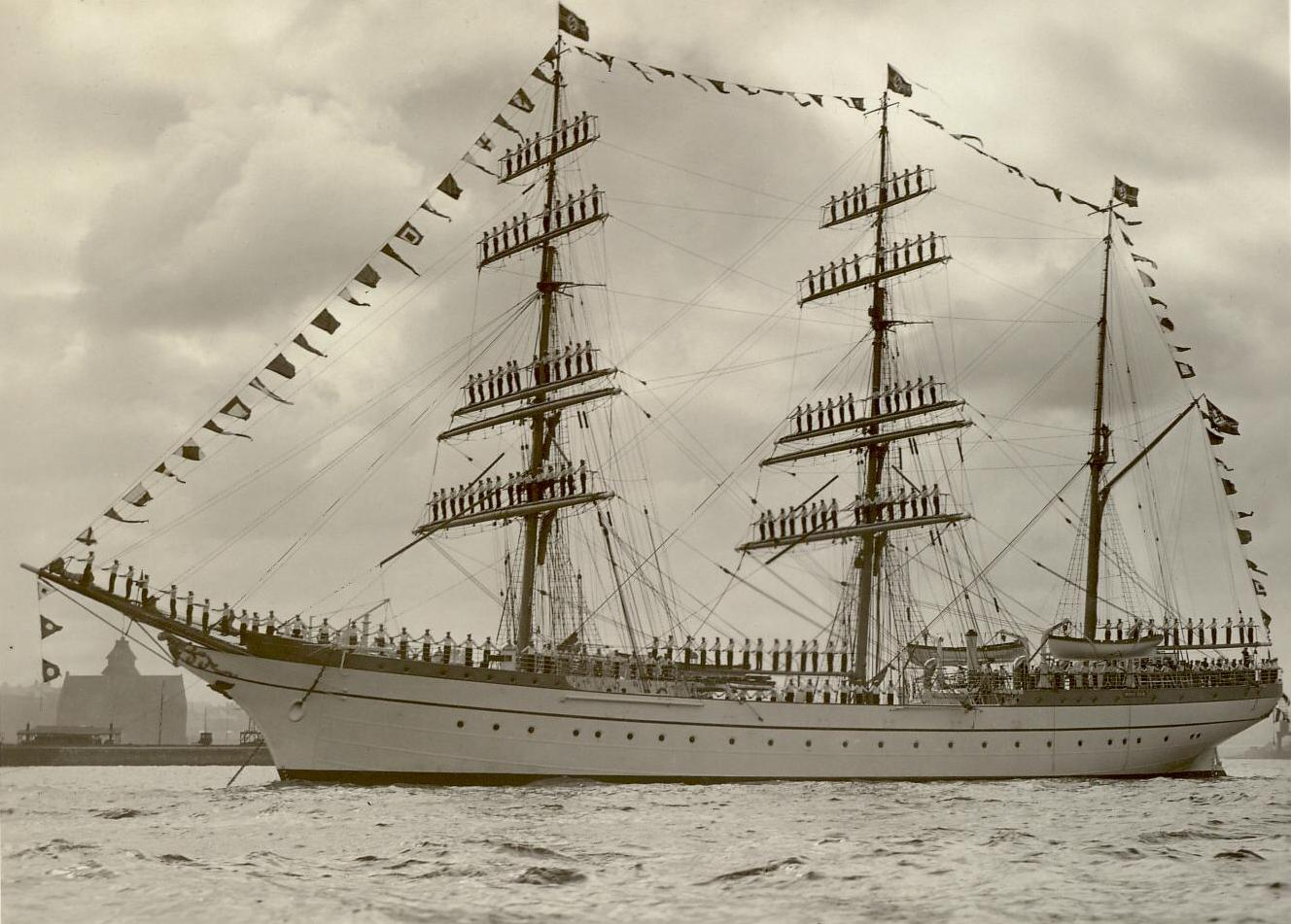 Segelschulschiff Gorch Fock bei Parade zur Einweihung Ehrenmal Laboe 1936